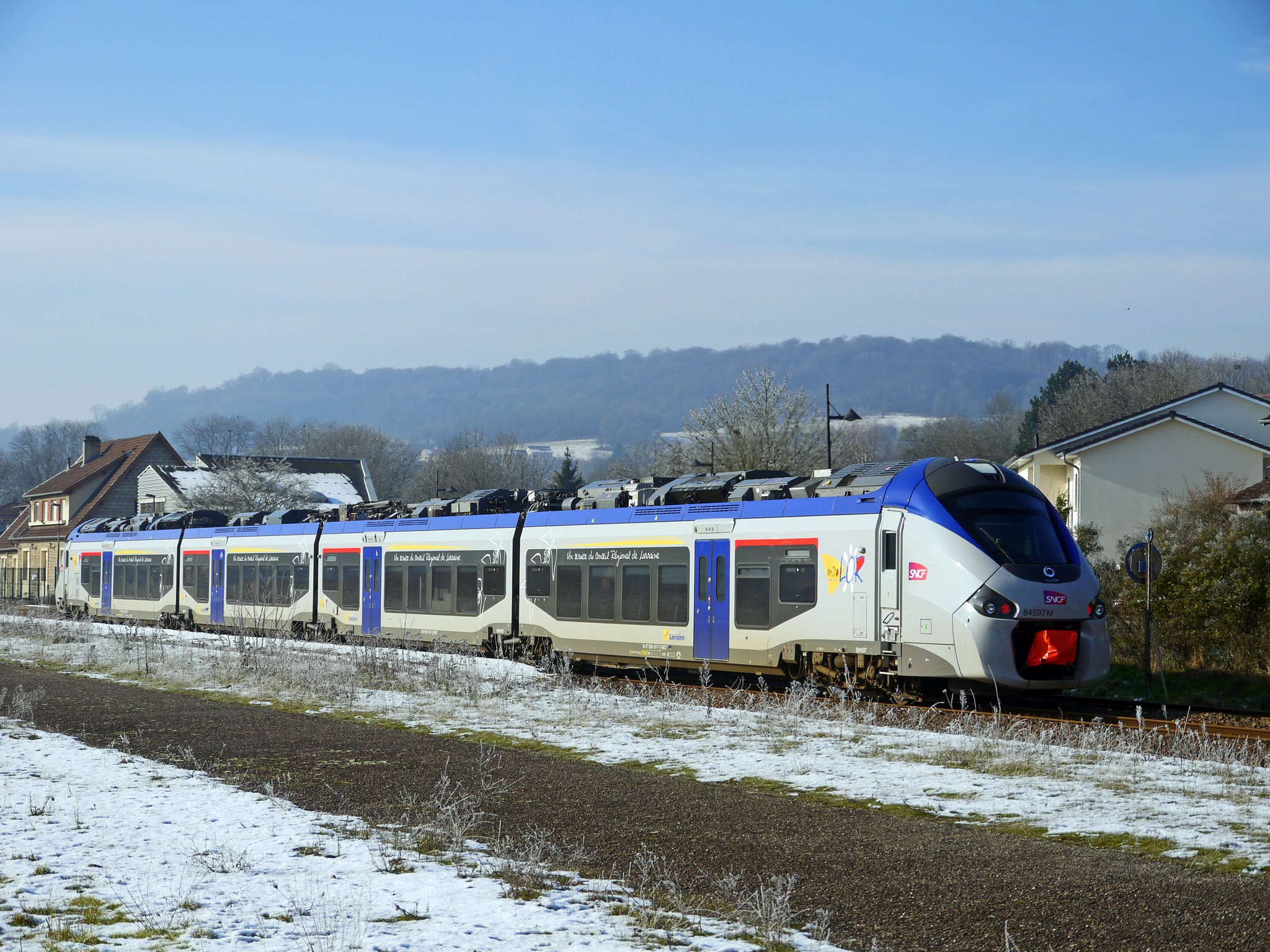 Régiolis en mode thermique en gare de Ludres sur une mission Nancy - Contrexeville